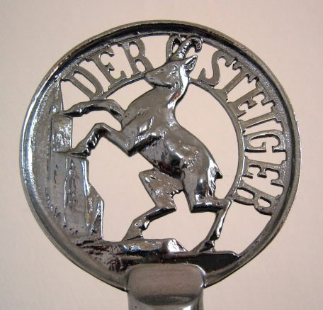 Steiger Kühlerfigur